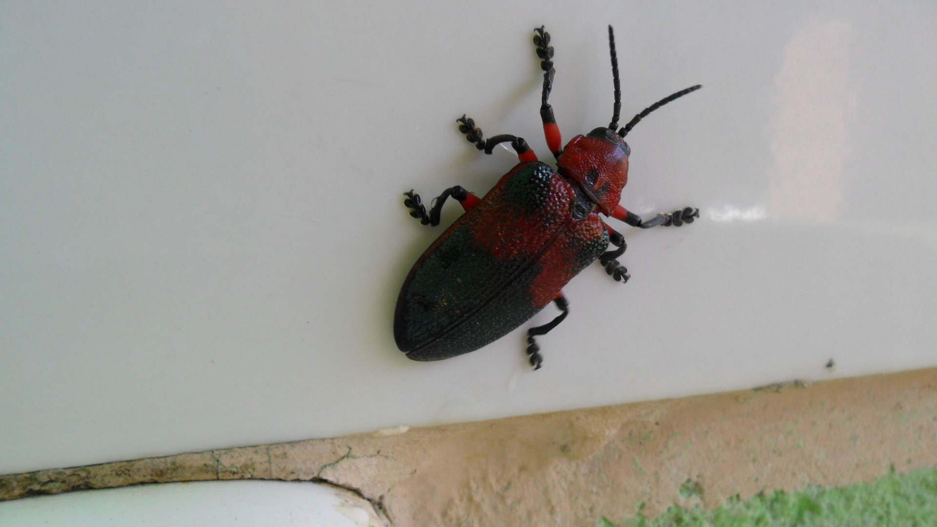 Coleoptero (adulto) considerado como uma "praga agrícola".